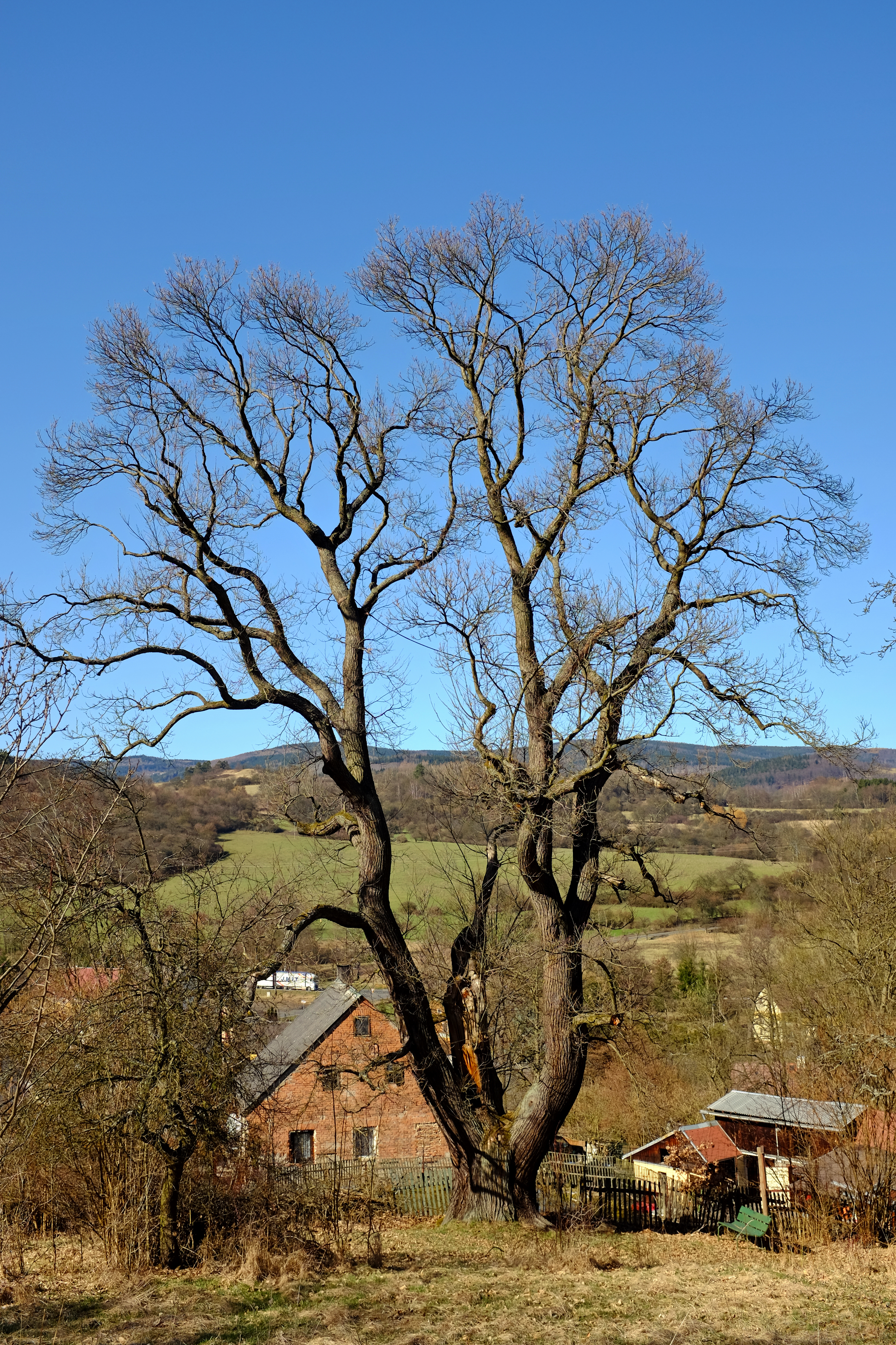 Památný strom - Damický kaštanovník - osada Damice, část obce Krásný Les, okres Karlovy Vary